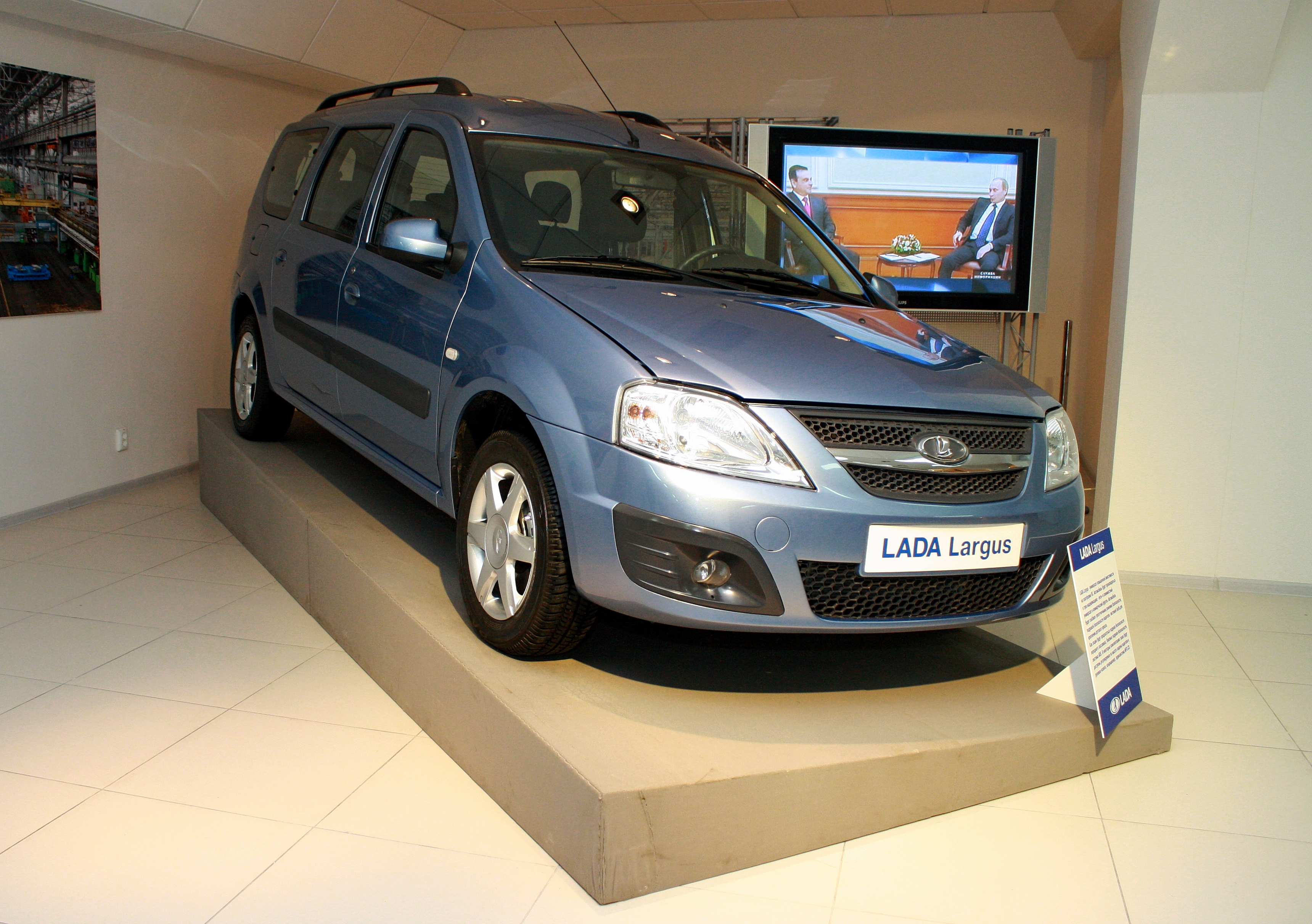 Largus в музее АвтоВАЗа